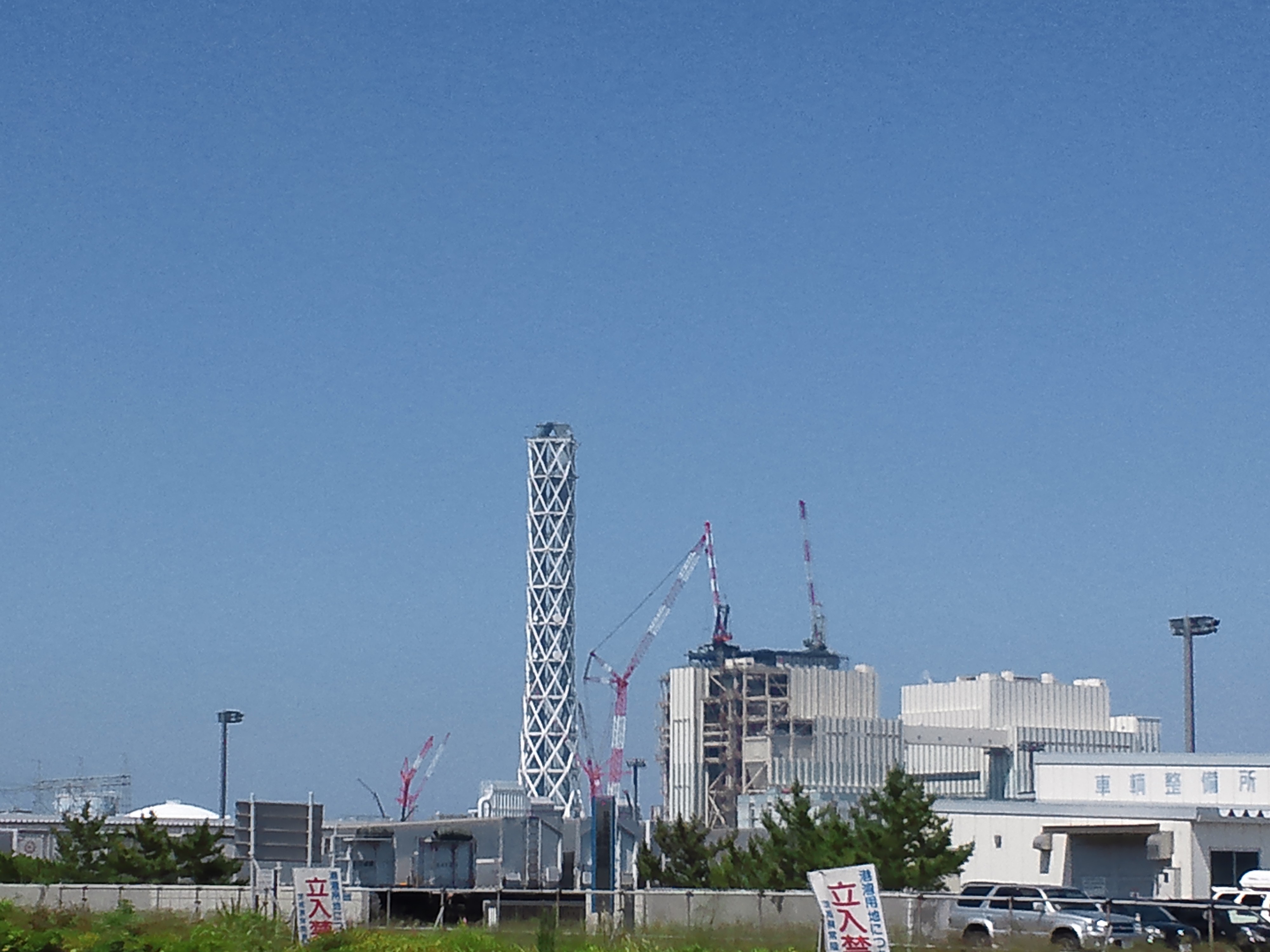 東京電力常陸那珂火力発電所